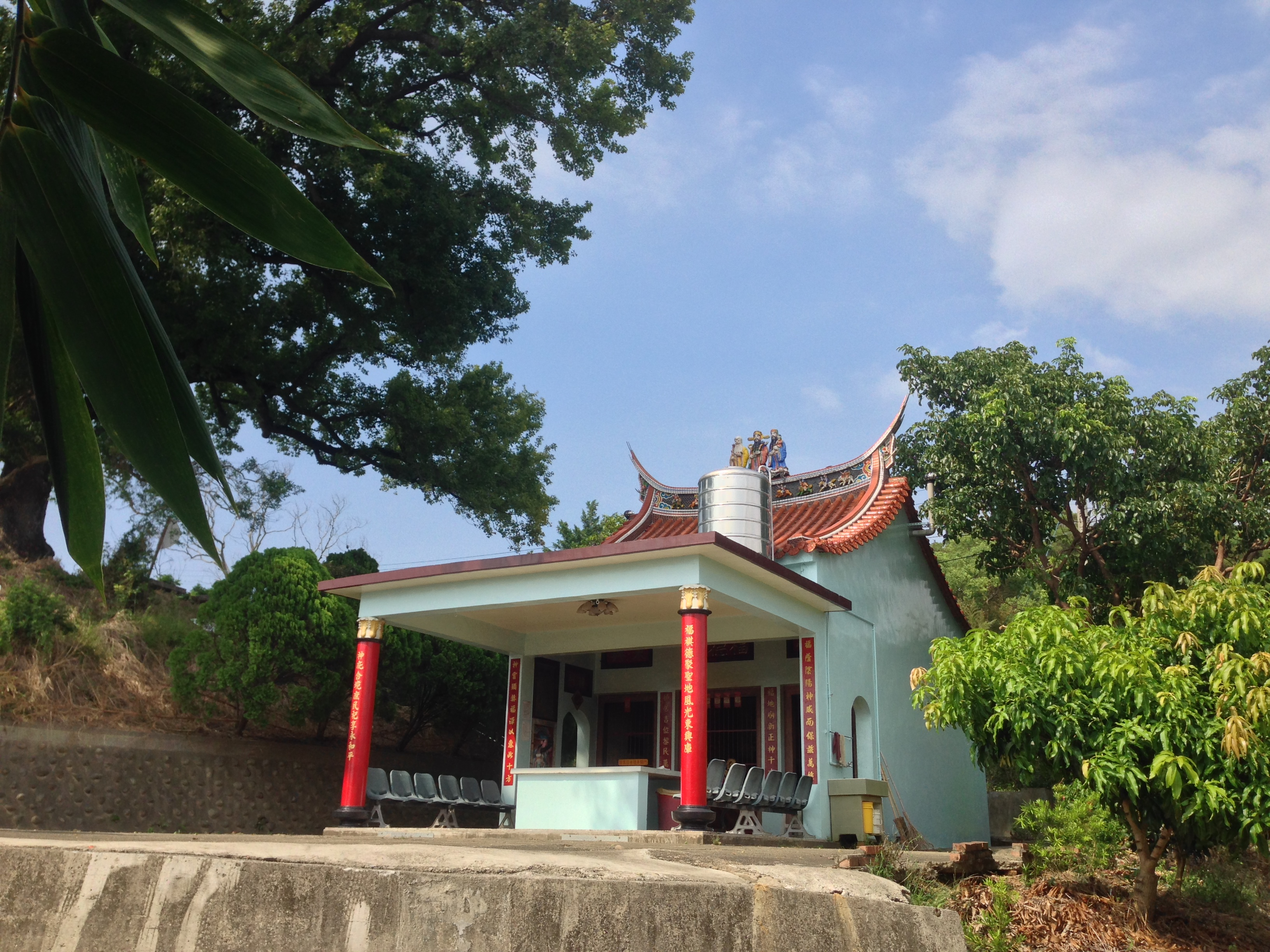 中文（台灣）: 永和山福德祠